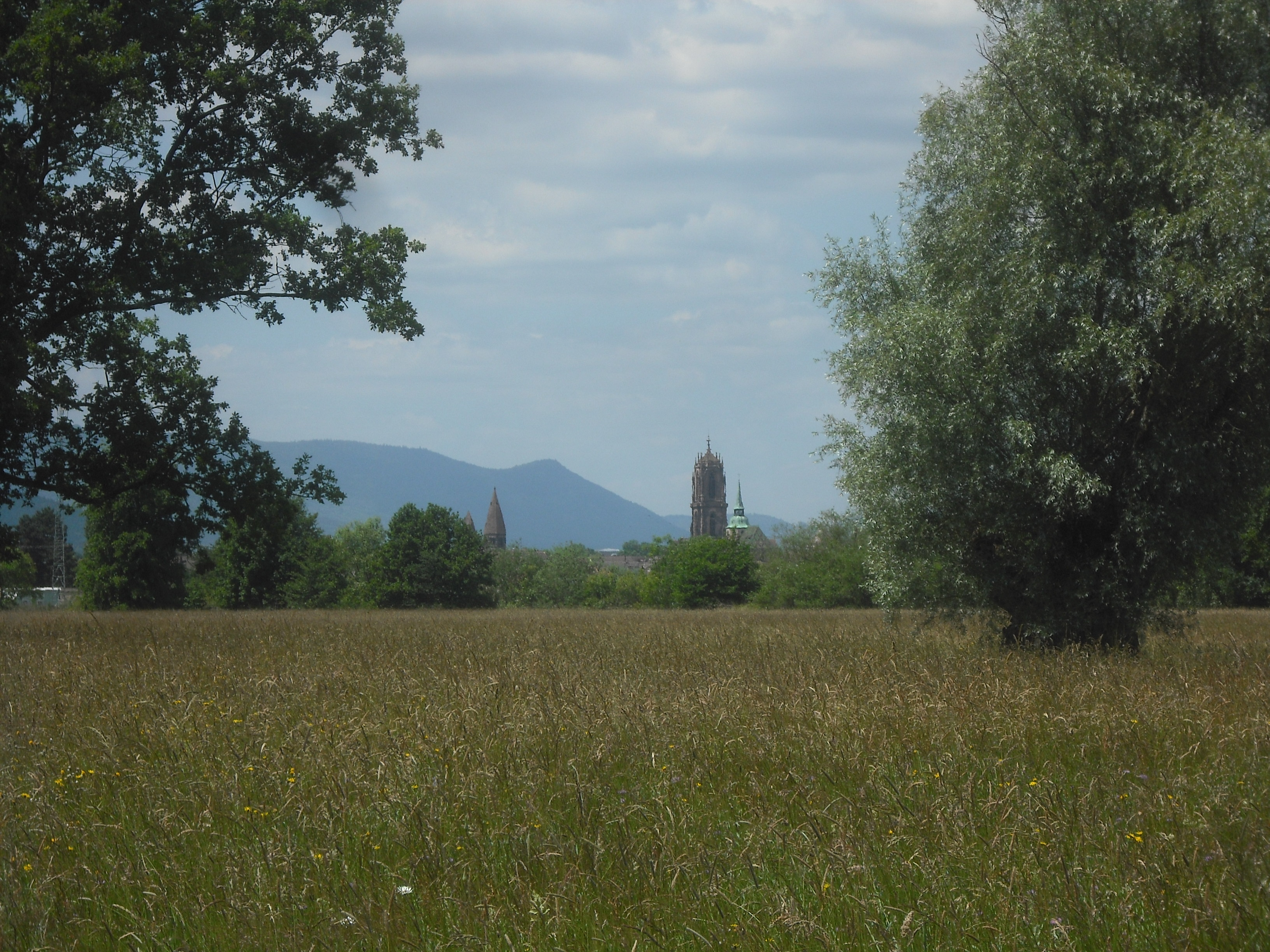 Ried de Sélestat, Bas-Rhin, France.